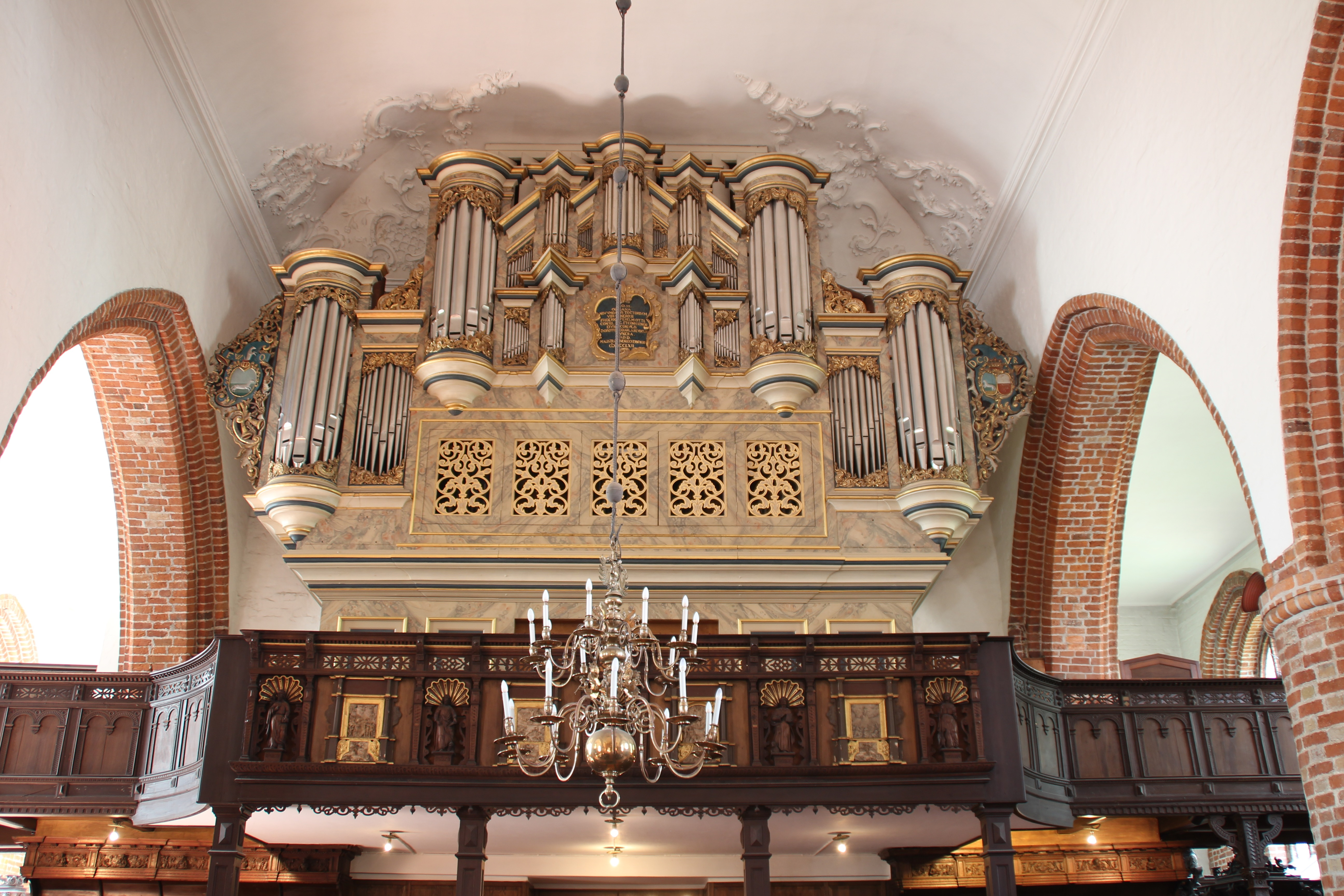 Johann Georg Heßler-Orgel (Hauptorgel) der Kirche St. Nicolai zu Eckernförde